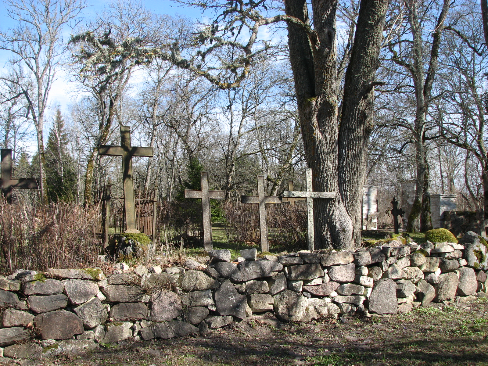 kirikuaia piirdemüür Hanila Pauluse kiriku ümber, aias paistab ka vana kalmistu